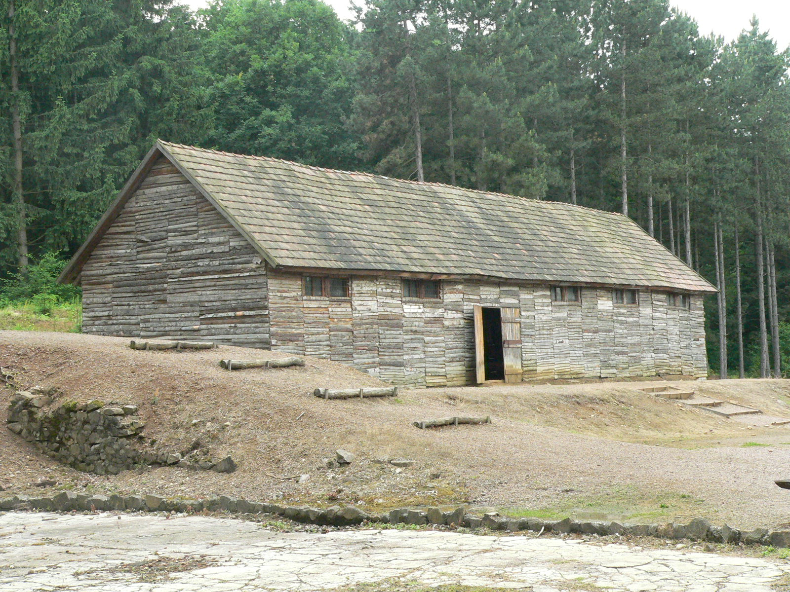 A recski tábor egyik barakkja